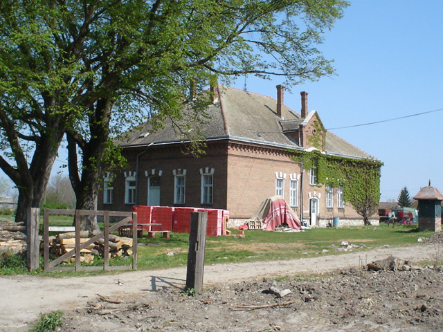 Old Castle in Majške Međe